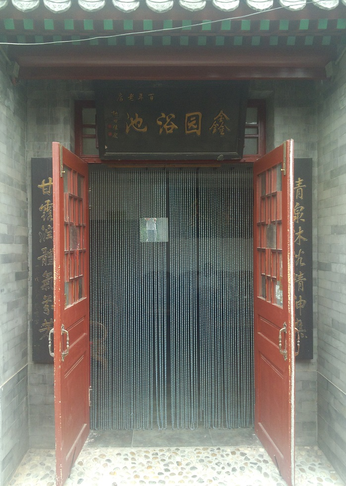 鑫园澡堂大门